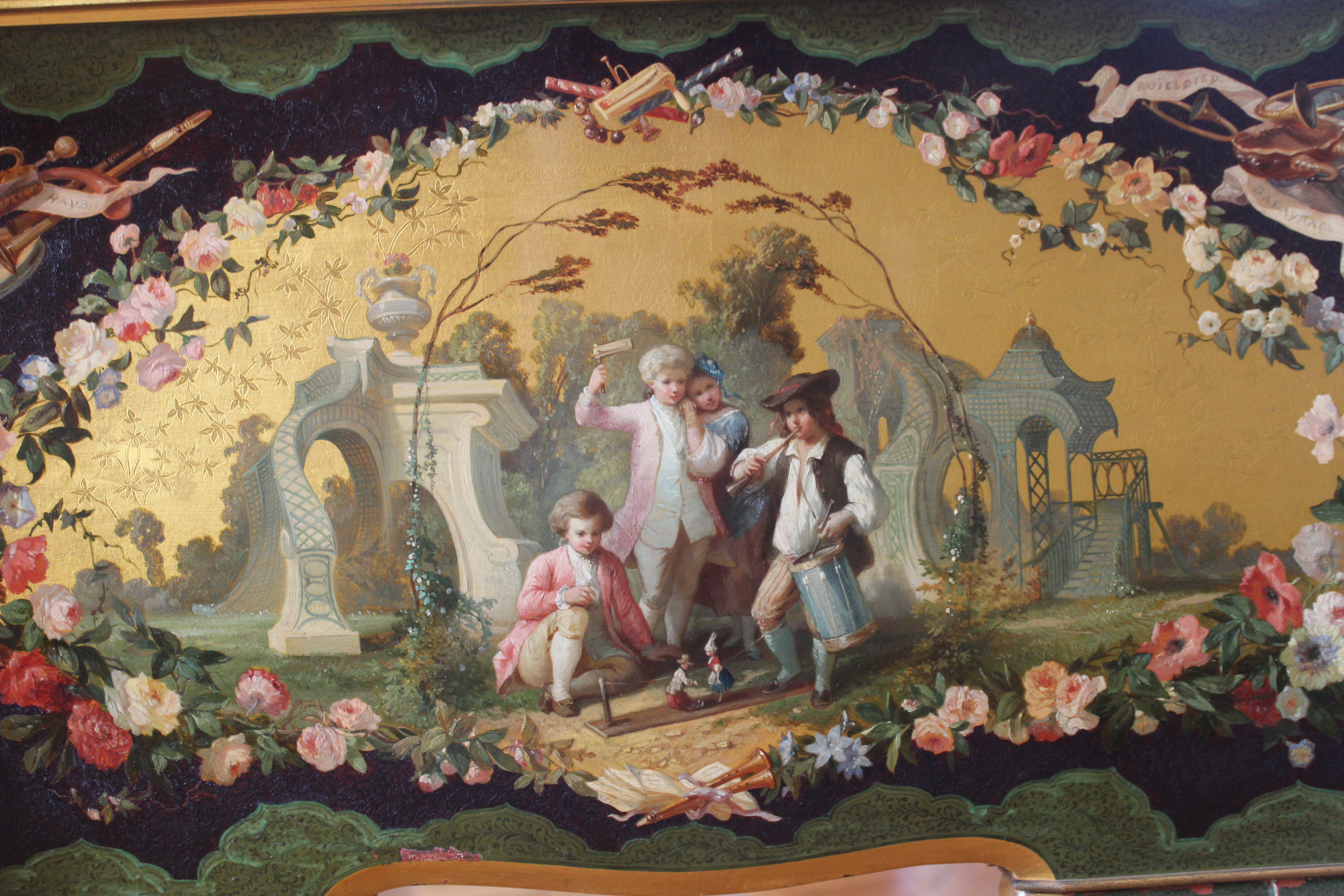 Vernon. Château de Bizy. Piano Érard.